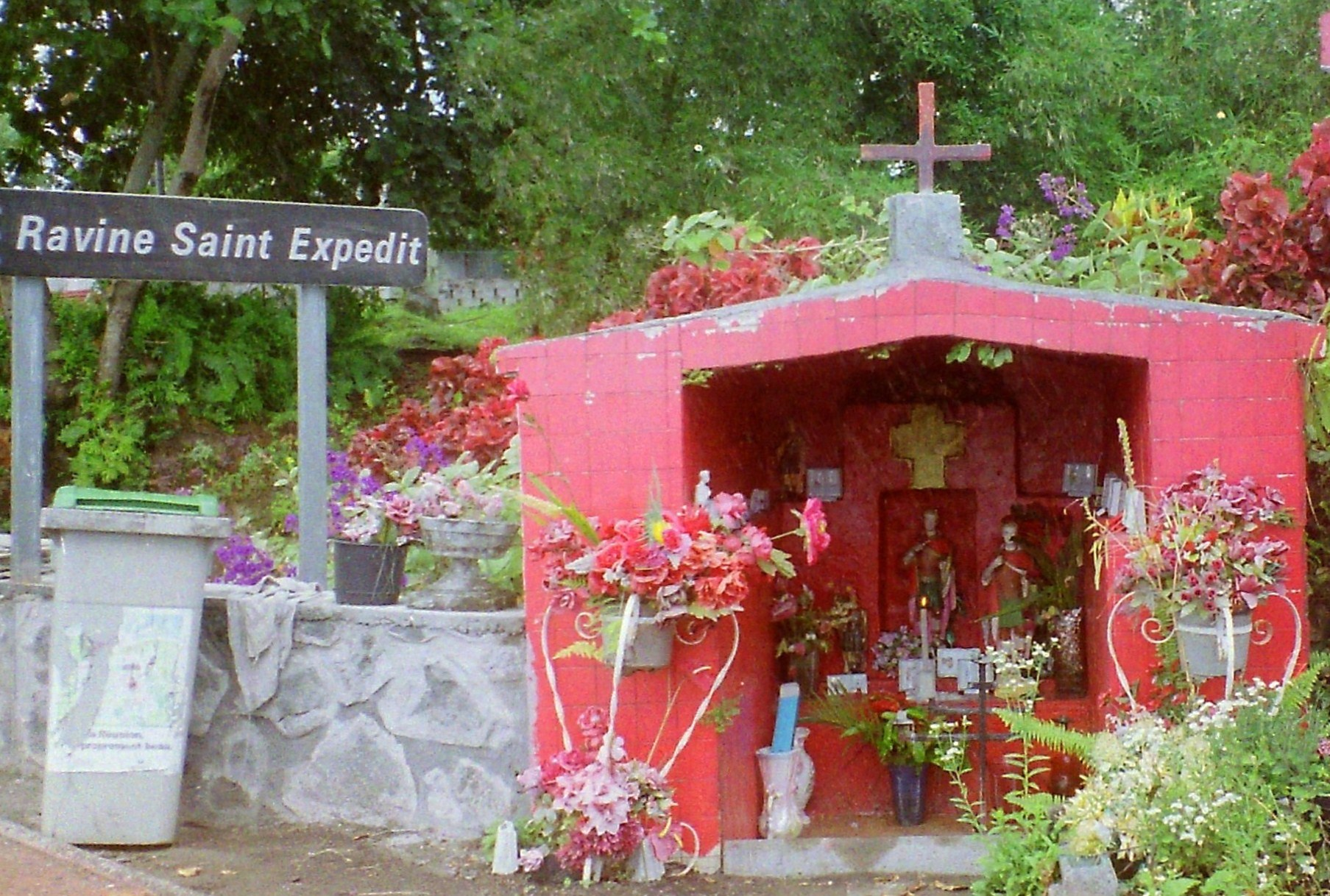 Scanner de photos prisens en 2000, sur l'îlede la Réunion